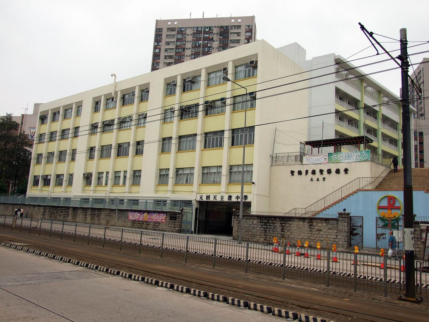 元朗天主教中學